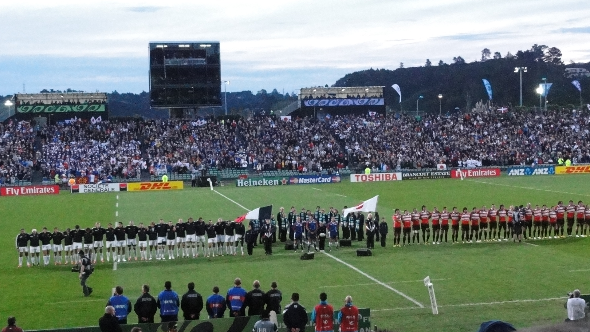 Match France-Japon pendant la Coupe du monde 2011